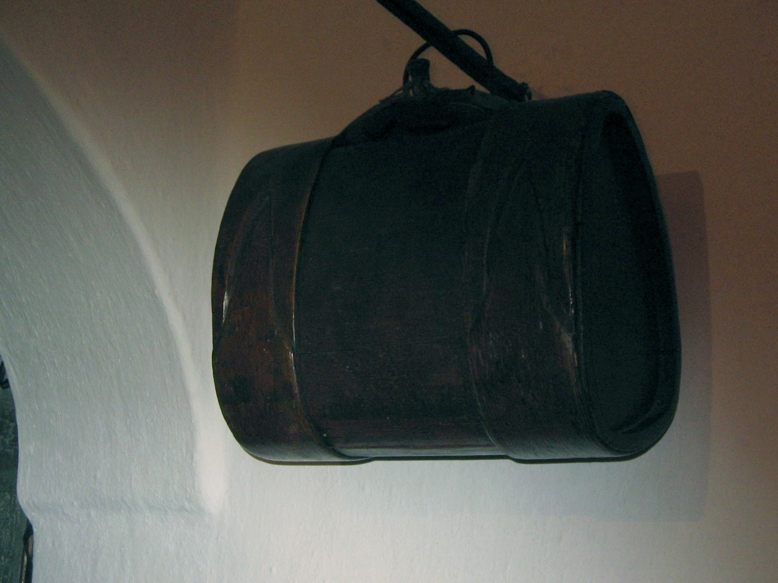 Putrih v hiši v Prešernove rojstne hiše v Vrbi na Gorenjskem. Fotografiral Janez Novak 19.08.2005.